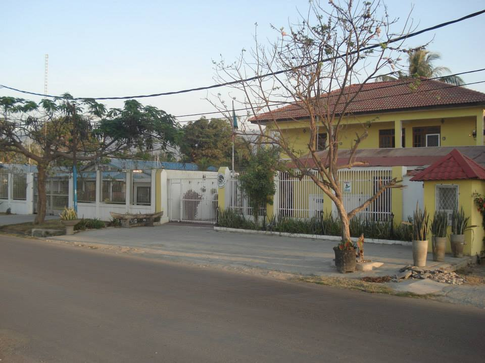 Honorarkonsulat von Mexiko, Avenida de_Portugal, proximo da Pertamina